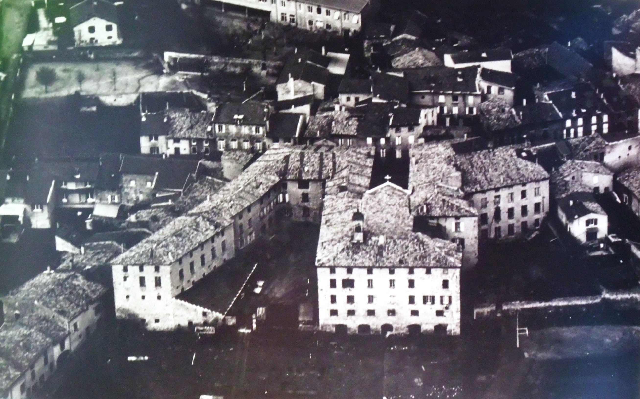 Boulieu couvent Ursulines